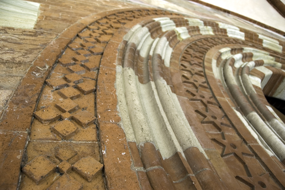 Abbazia di Chiaravalle della Colomba - Porto dello capitolo / Chiaravalle della Colomba - Chapter House's gate